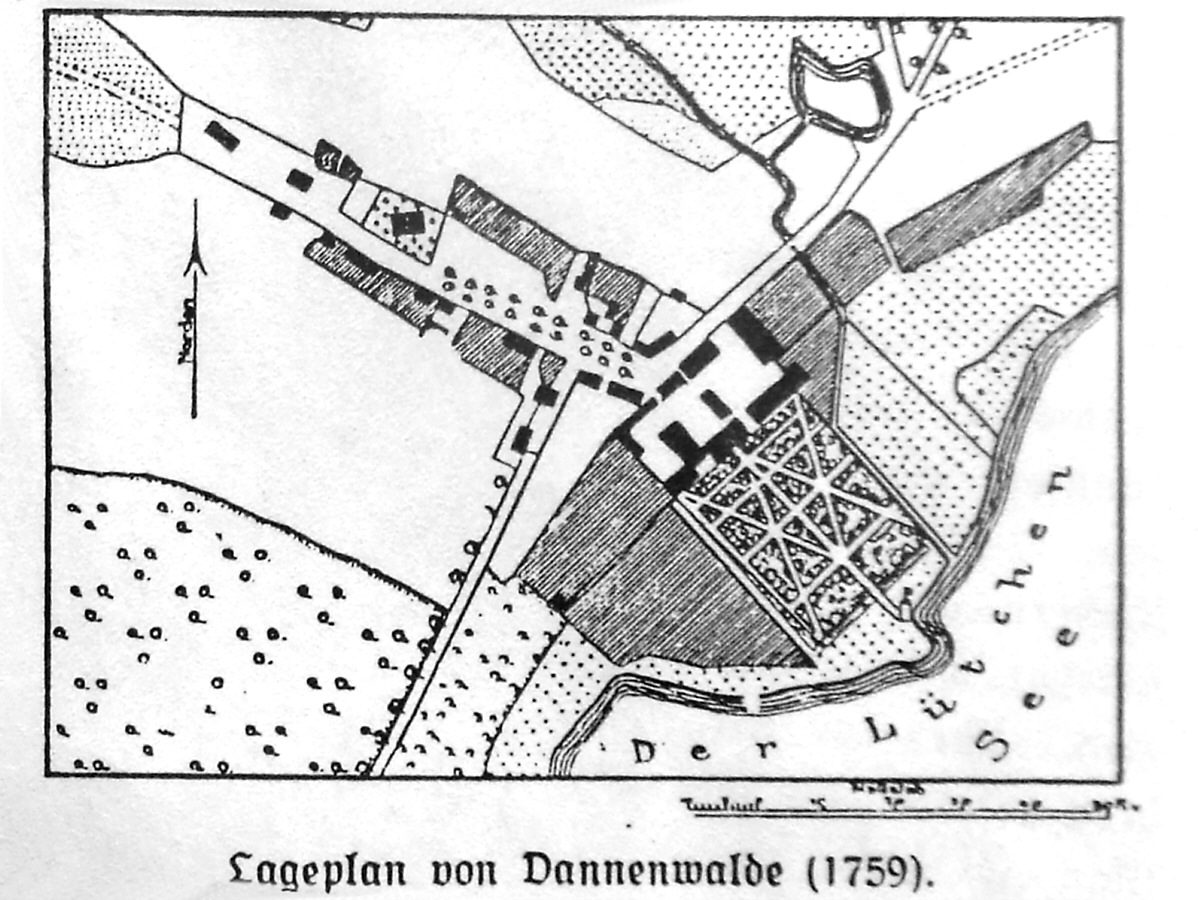 Lageplan des Dorfes Dannenwalde 1759 (heute Stadtteil von Gransee, Brandenburg)